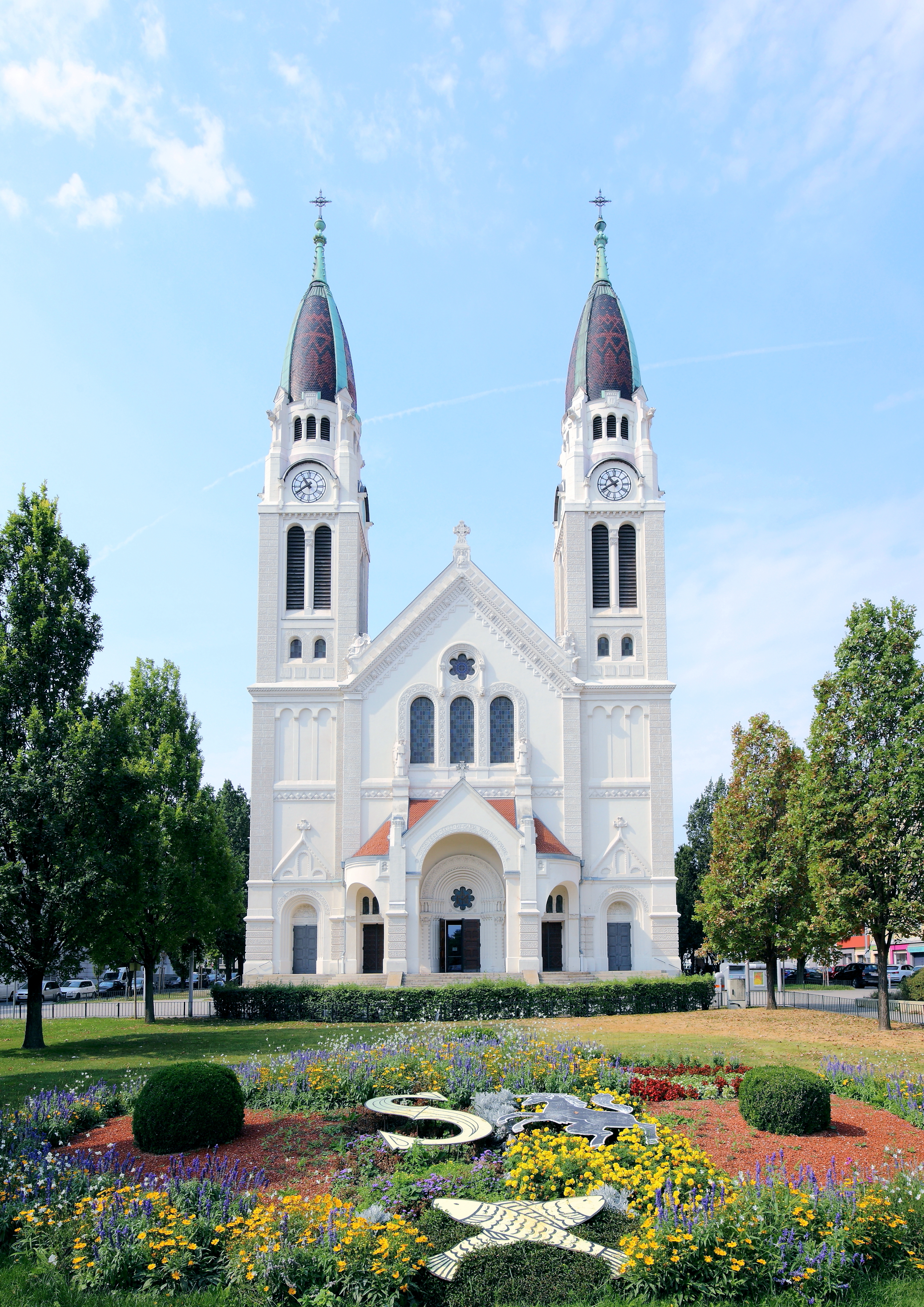 Hauptfassade der röm.-kath. Pfarrkirche Neusimmering Zur unbefleckten Empfängnis im 11. Wiener Gemeindebezirkes Simmering. Die Kirche wurde von 1907 bis 1910 nach Plänen des Architekten Hans Schneider errichtet. Sie weist romanisierende Formen mit einzelnen secessionistischen Dekorelementen auf.